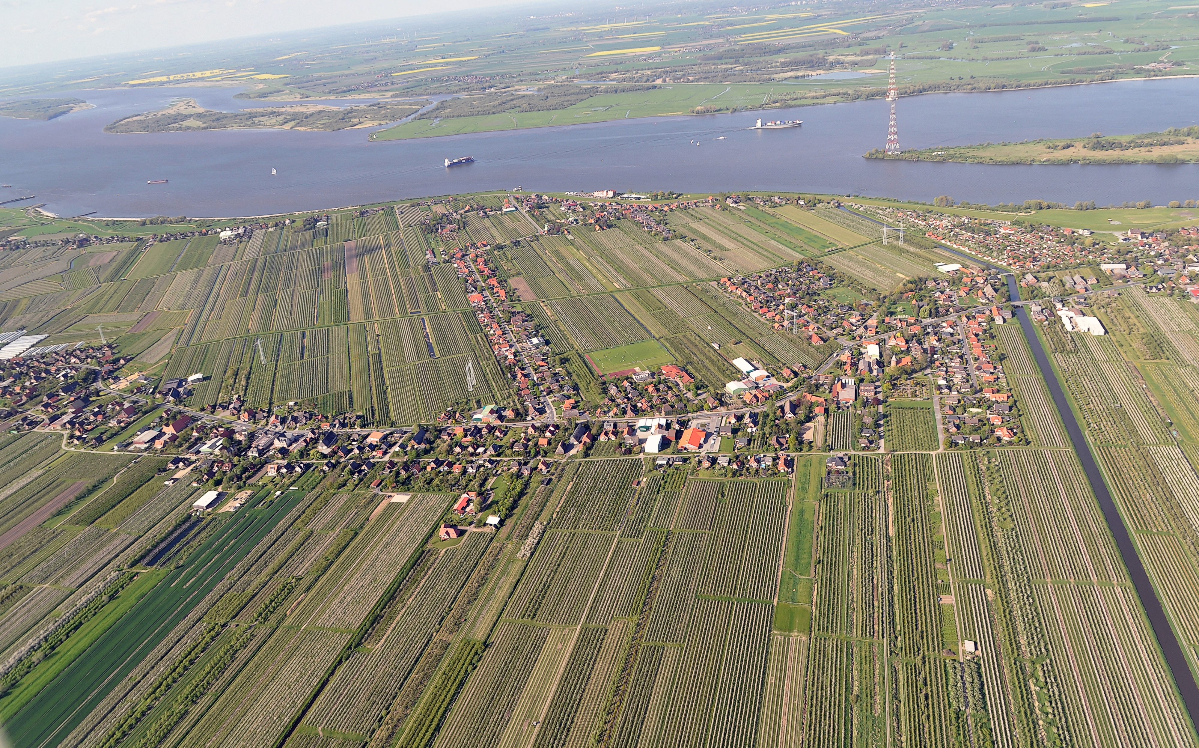 Luftbilder von der Nordseeküste 2012-05